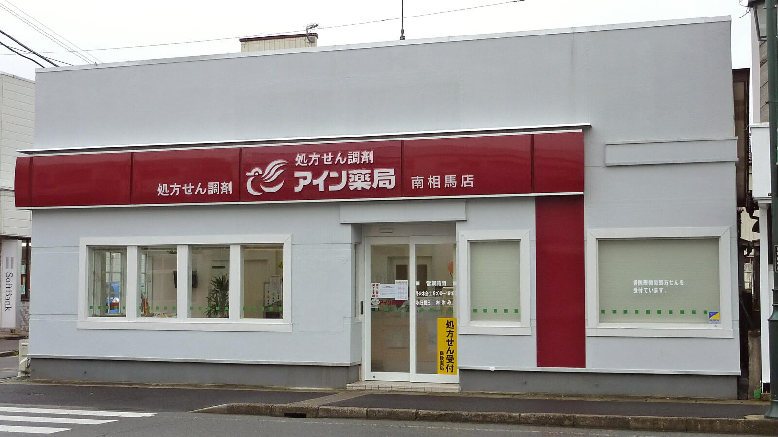 アイン薬局南相馬店